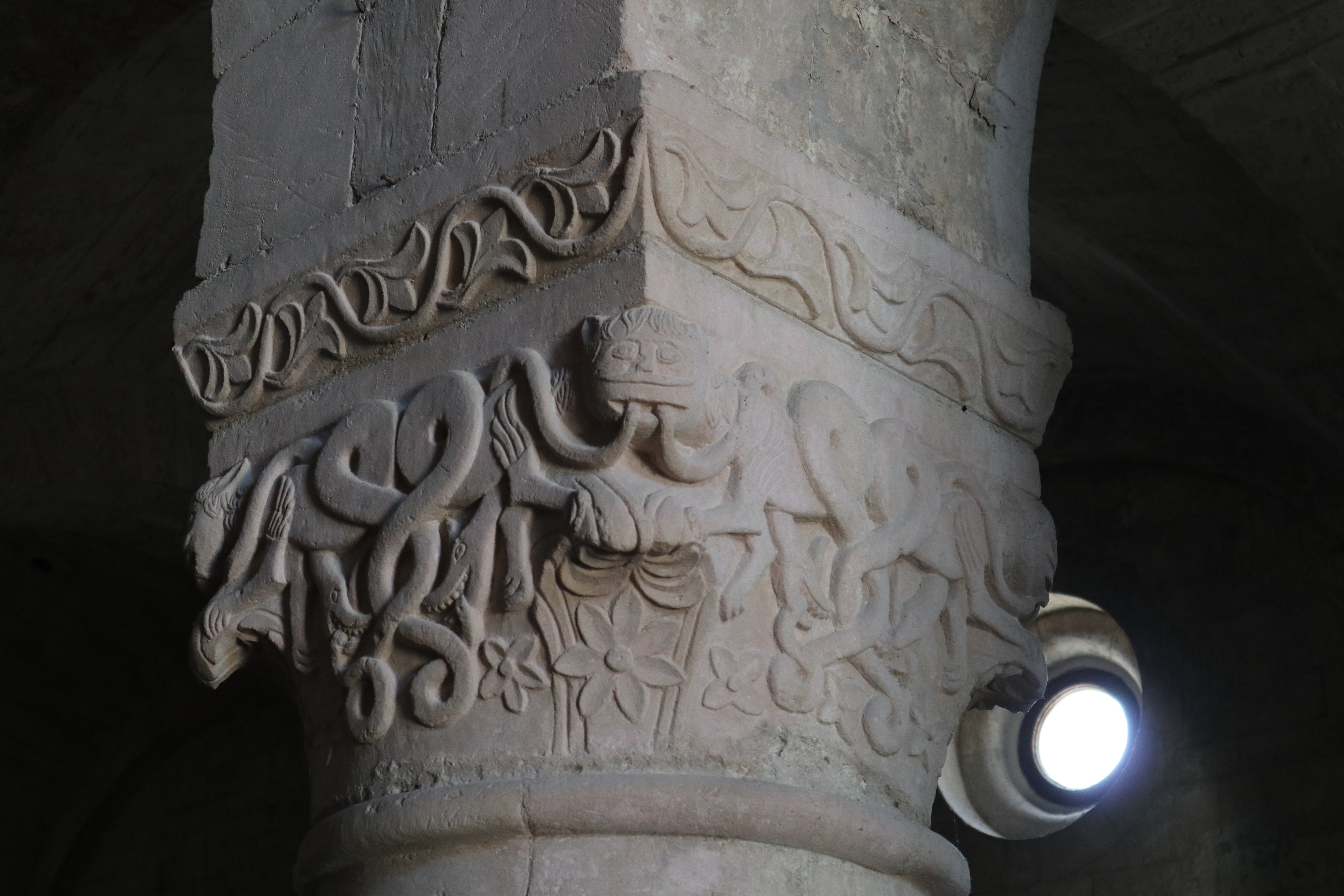 un capitello della chiesa